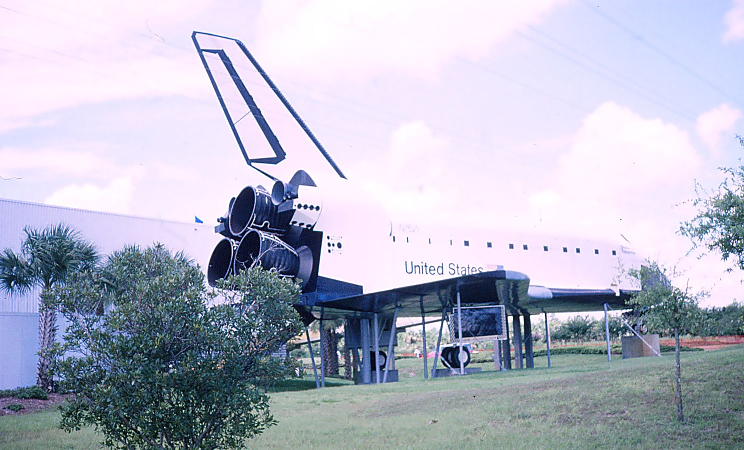 En 1:1 kopi af rumfærge på "Kennedy Space Center Visitor Complex", 8. juli 1994